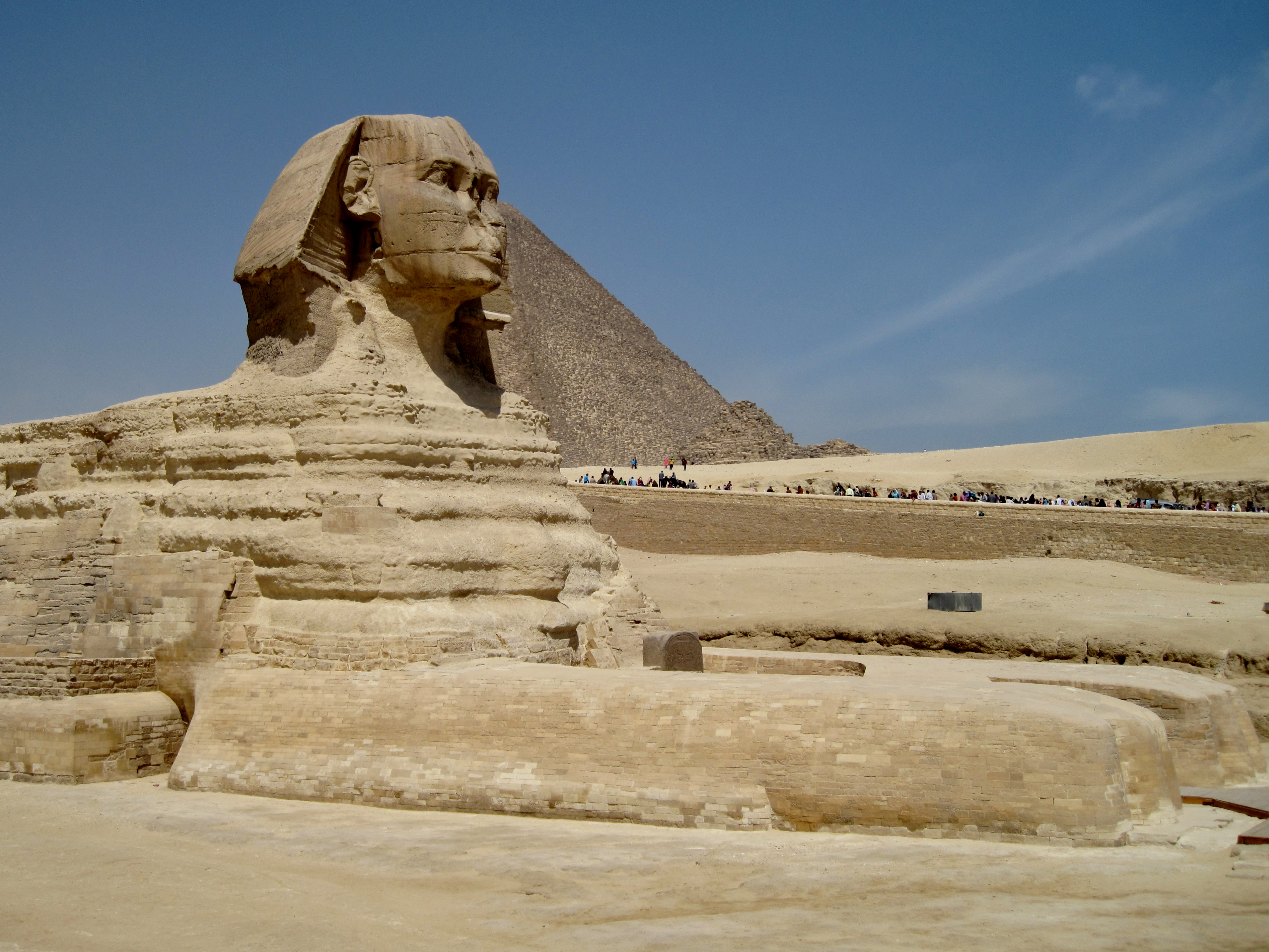 Der Sphinx vor der Cheops-Pyramide auf dem Giseh-Plateau bei Kairo, Ägypten